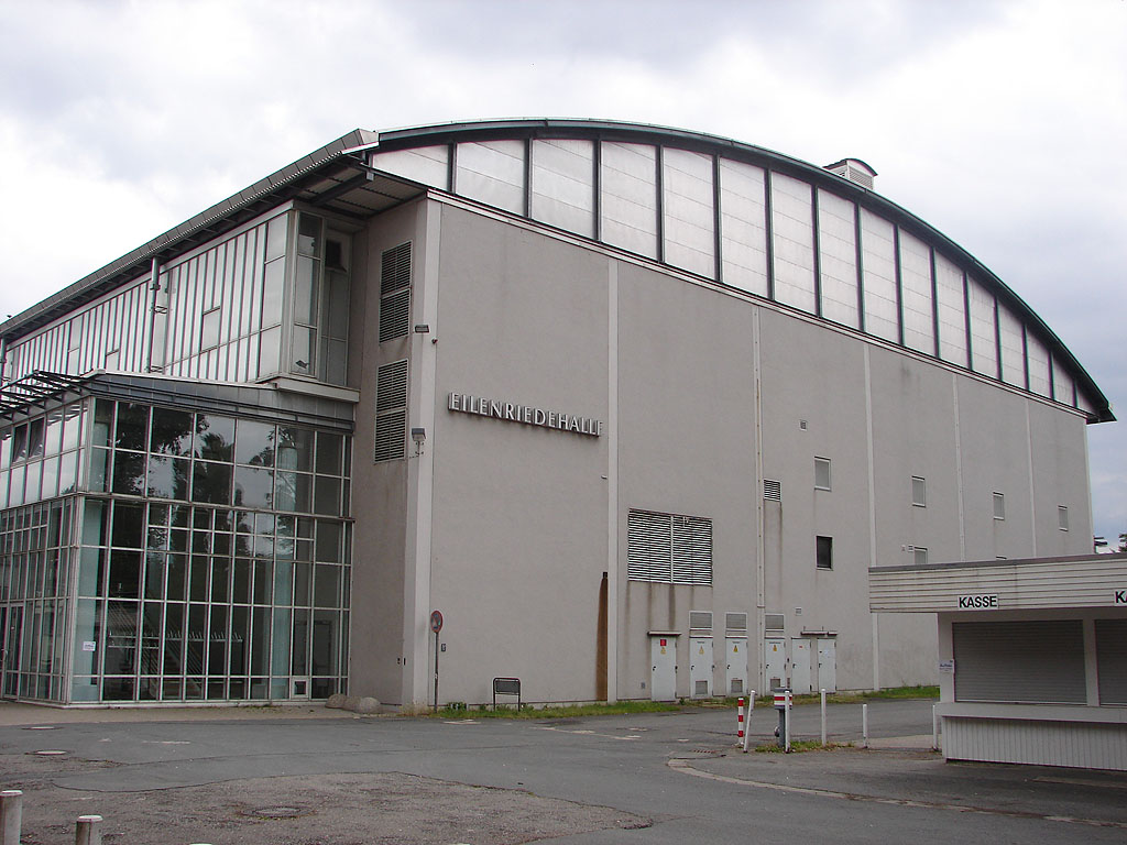 Die Eilenriedehalle am HCC